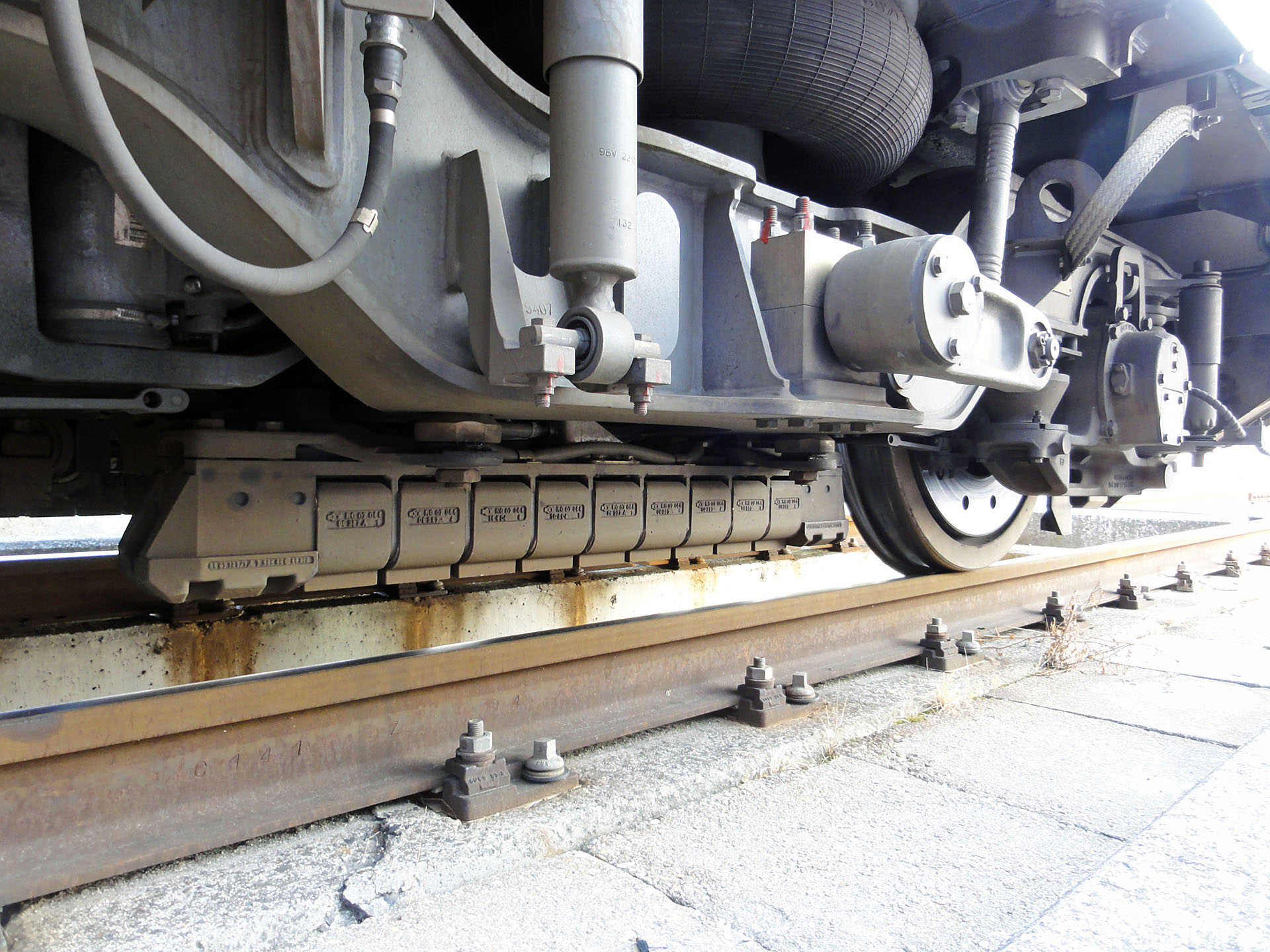 Frein magnétique sur le premier bogie d'un élément Z 50000 au technicentre Paris Nord-Joncherolles, Villetaneuse, Seine-Saint-Denis, France.